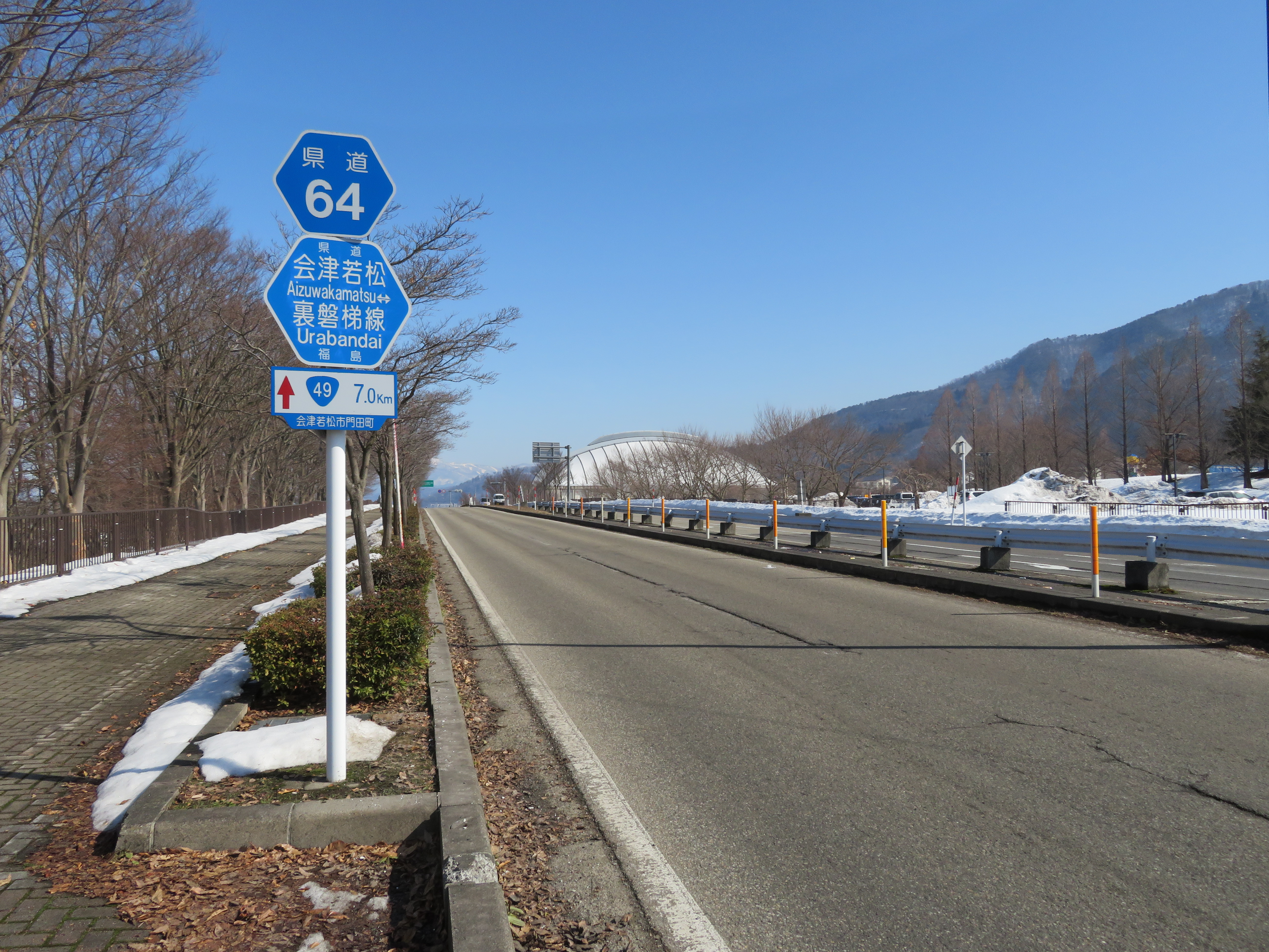 福島県道64号線会津若松市門田町付近（国道49号線方面を撮影） Canon PowerShot SX720 HS